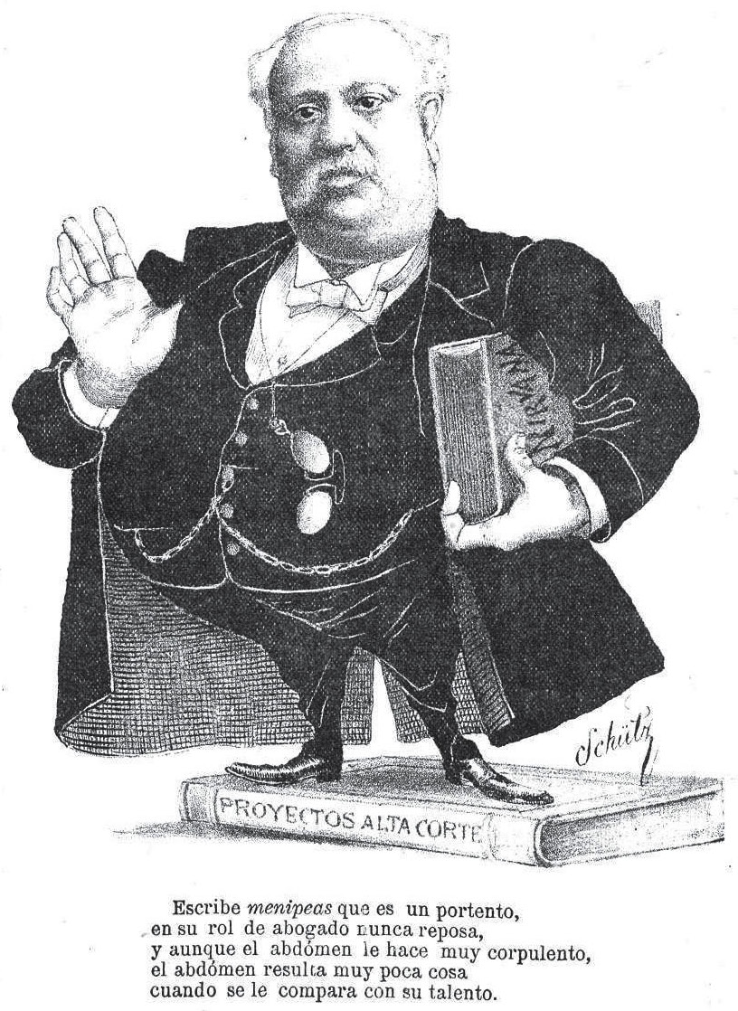 Caricatura de Ángel Floro Costa por Charles Schütz aparecida en el nº2 de la publicación Caras y Caretas de Uruguay el 27-7-1890.